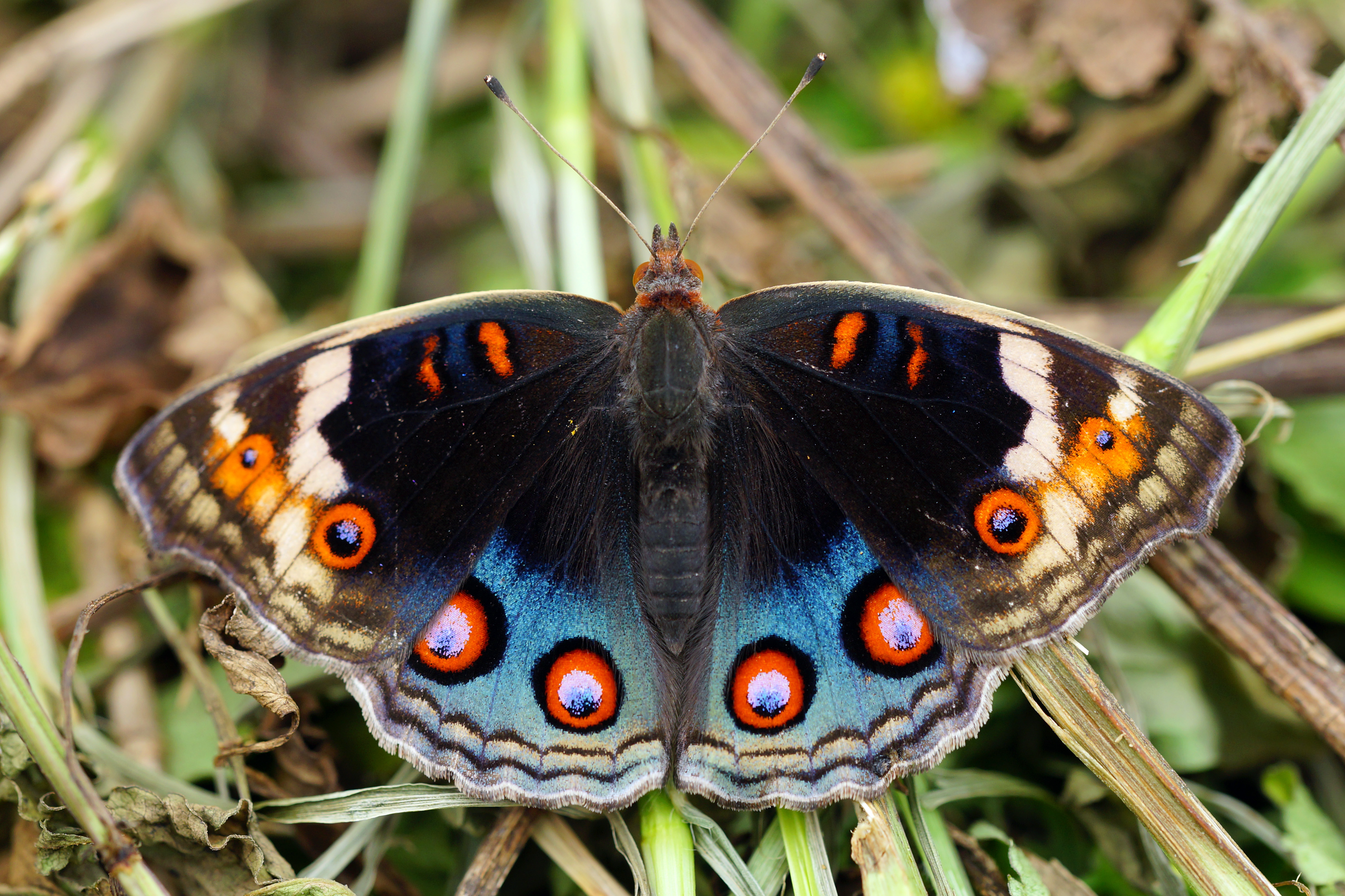 青眼蛺蝶 Junonia orithya